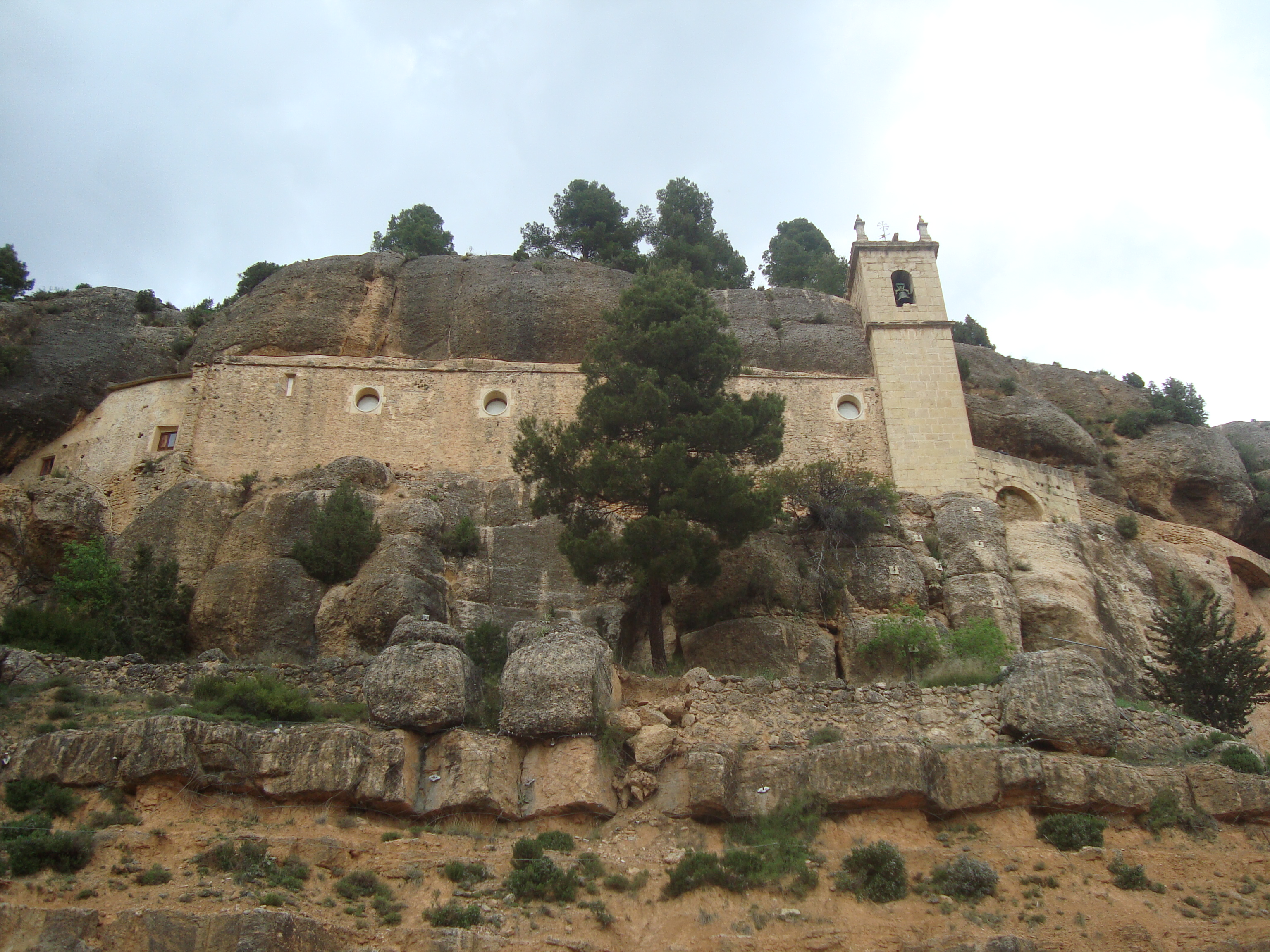 Santuari de la Mare de Déu de la Balma (Sorita)